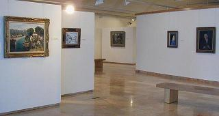 אגף האמנות - מוזיאון הכט